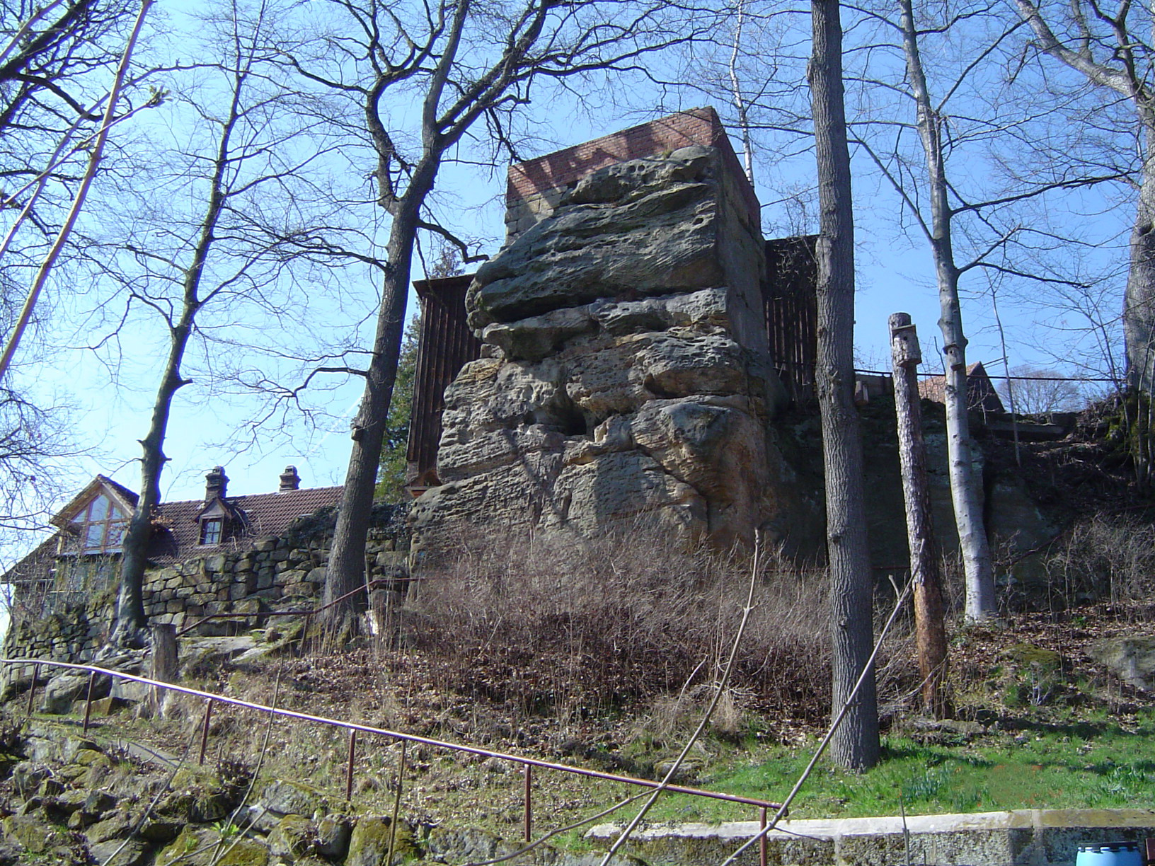 Hirtenstein von Mistelbach – Naturdenkmal (Geotop-Nr. 472R153)